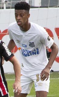 Foto: Douglas Teixeira/Futebol Santista